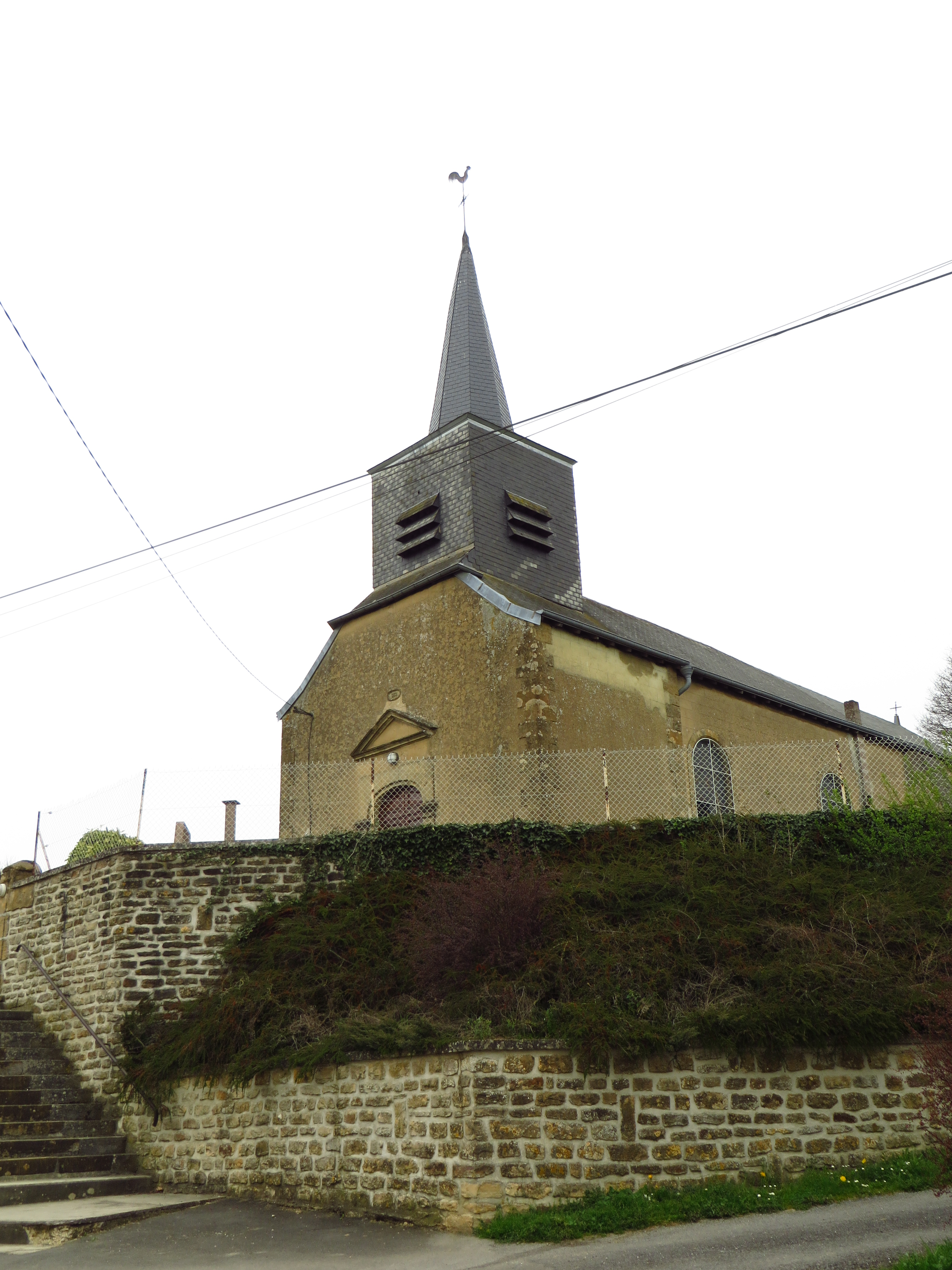 Sachy Église Saint-Remi